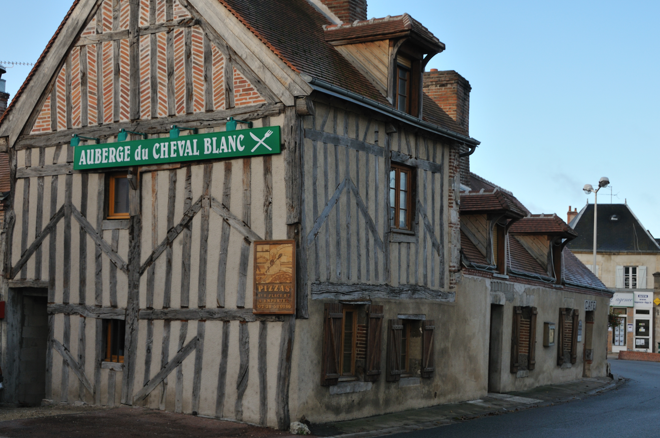 Auberge du Cheval Blanc, Tigy, Loiret, France